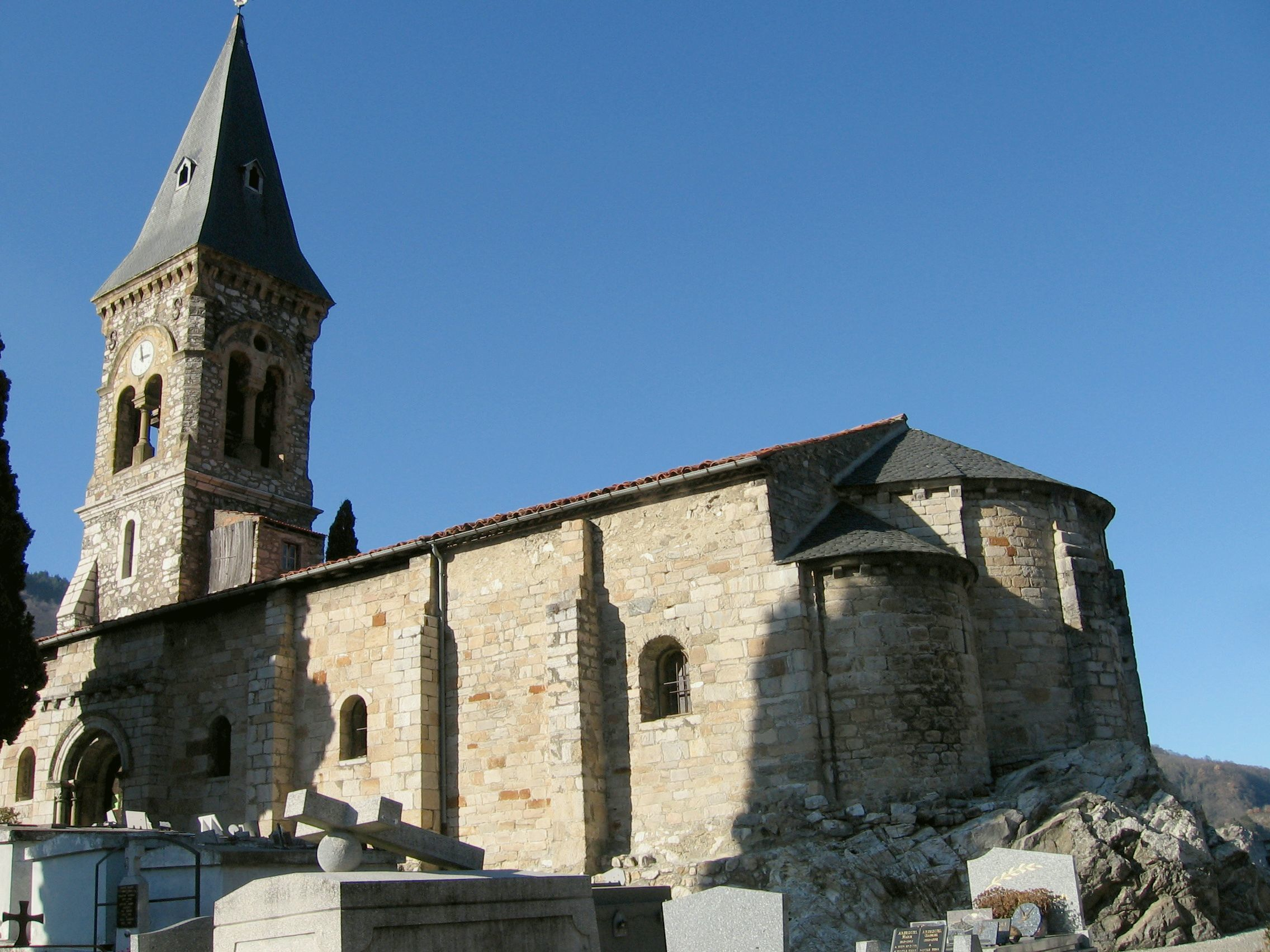 Eglise de Mercus-Garrabet.